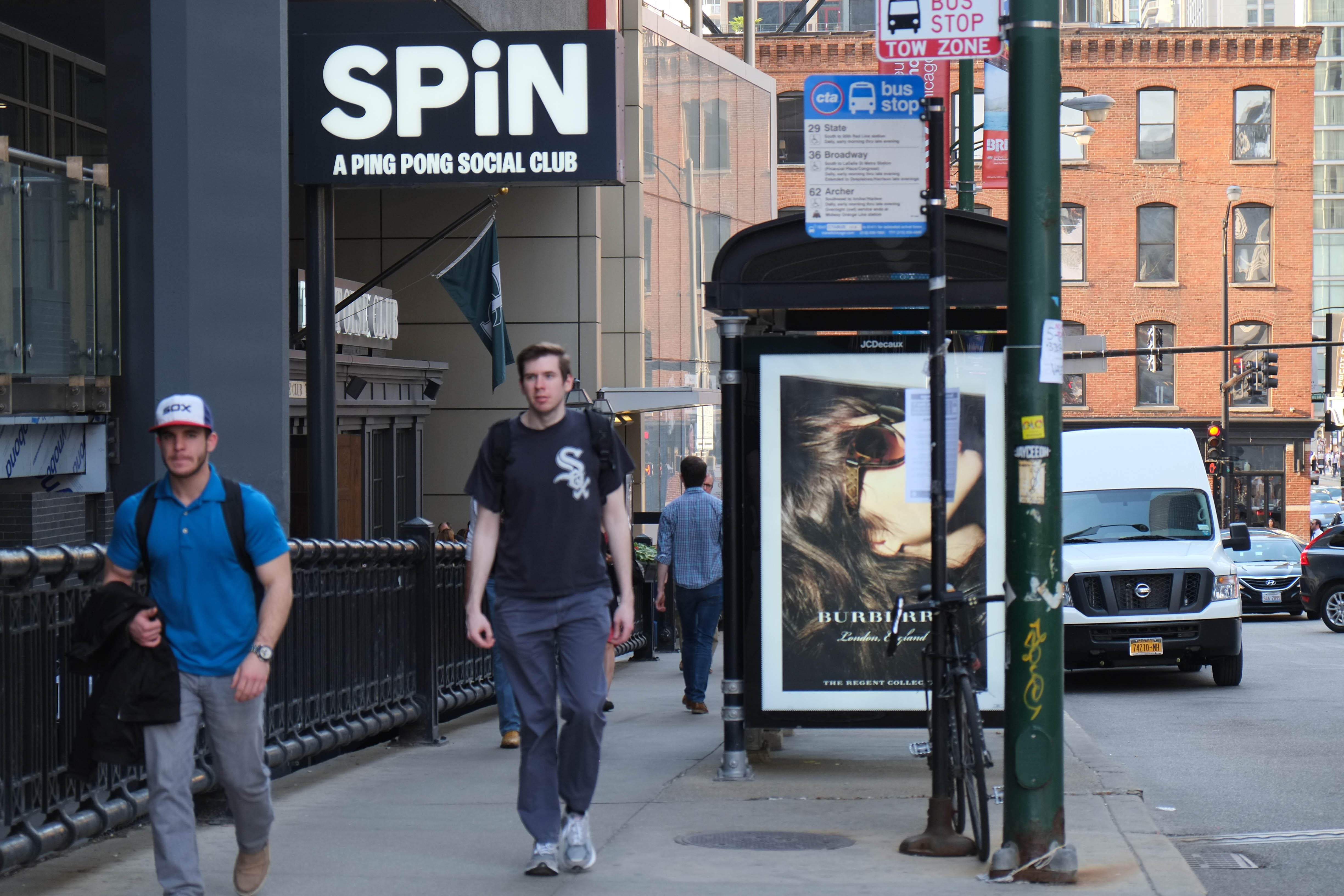 A Ping Pong Social Club